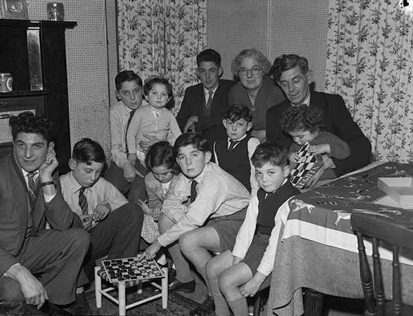 Teitl Cymraeg/Welsh title: Plant Mr a Mrs Owen Meredydd Williams yn disgwyl yn eiddgar am y Nadolig - y deg ohonyn nhw! Ffotograffydd/Photographer: Geoff Charles (1909-2002) Dyddiad/Date: December 23, 1959 Cyfrwng/Medium: Negydd ffilm / Film negative Cyfeiriad/Reference: (gch21282) Rhif cofnod / Record no.: 3470469 Rhagor o wybodaeth am gasgliad Geoff Charles yn Llyfrgell Genedlaethol Cymru More information about the Geoff Charles Collection at the National Library of Wales